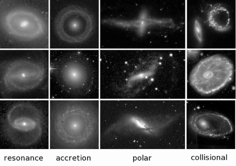 Представлено сравнение различных типов